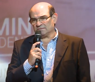 Humberto Tumini lanzando su pre-candidatura a Presidente en Palermo